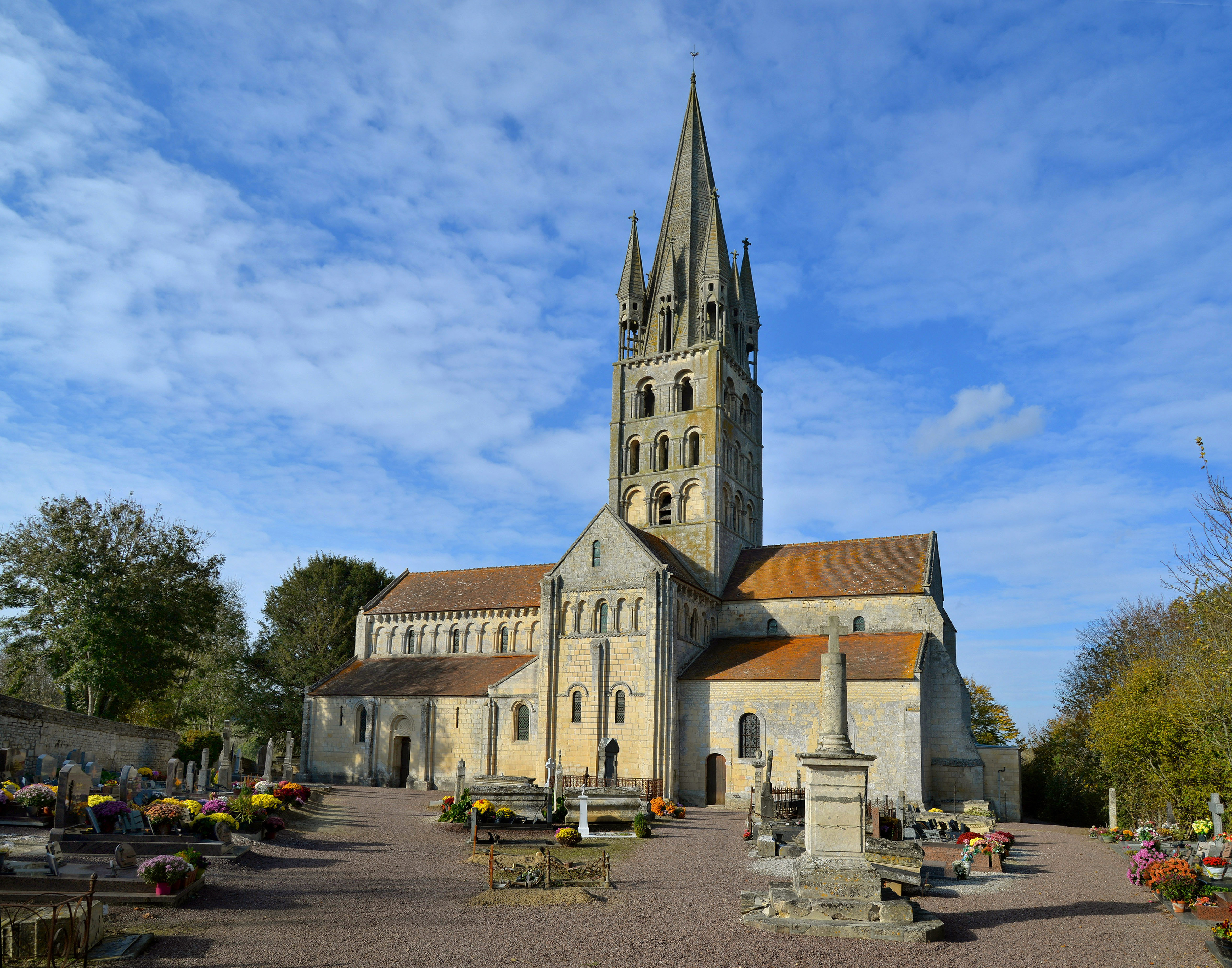 Secqueville-en-Bessin (Calvados)